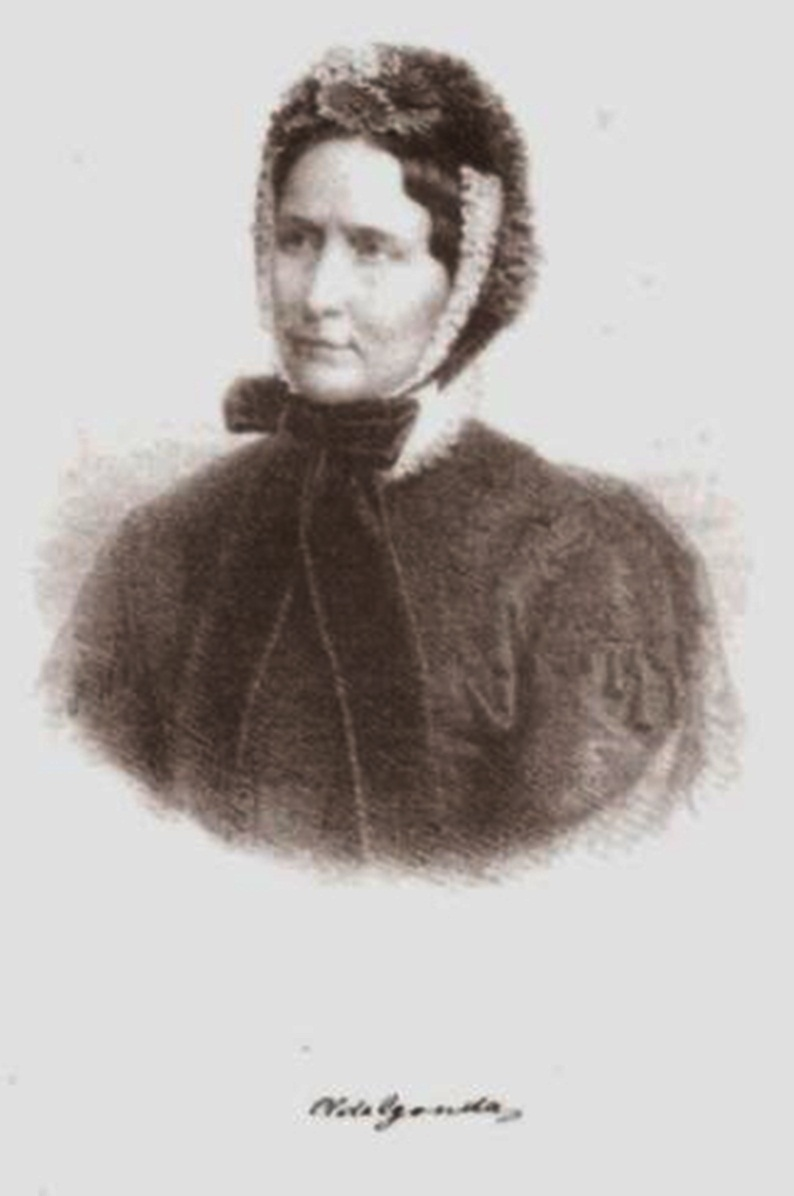 Adelgonda Duchessa di Modena